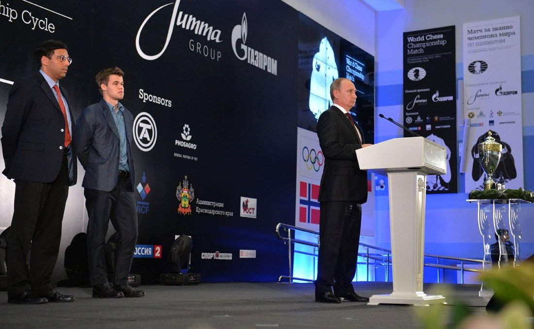 Выступление президента Путина на церемонии закрытия Матча на звание чемпиона мира по шахматам. Сочи, ноябрь 2014.